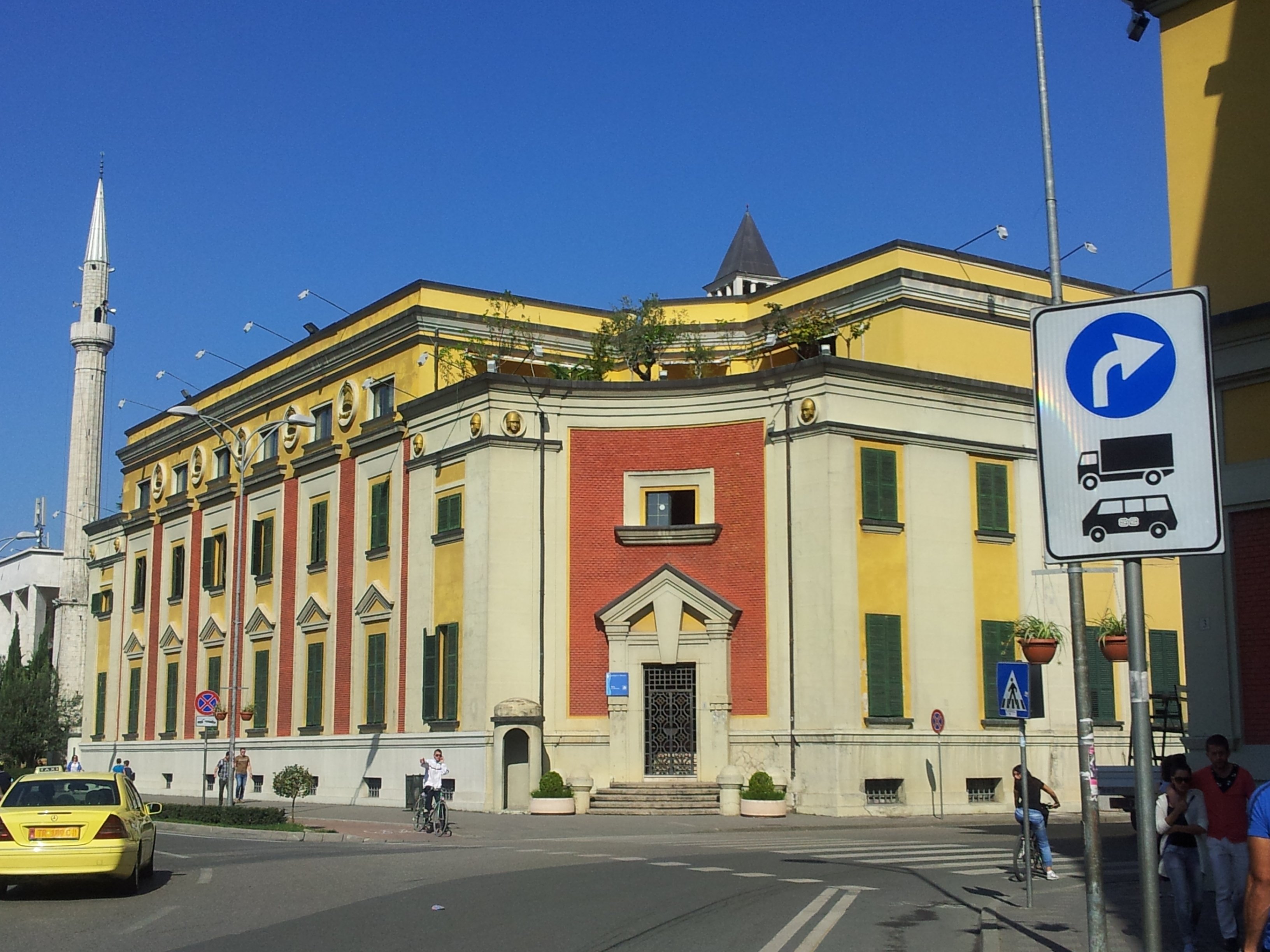 Bashkia e Tiranës, Tiranë